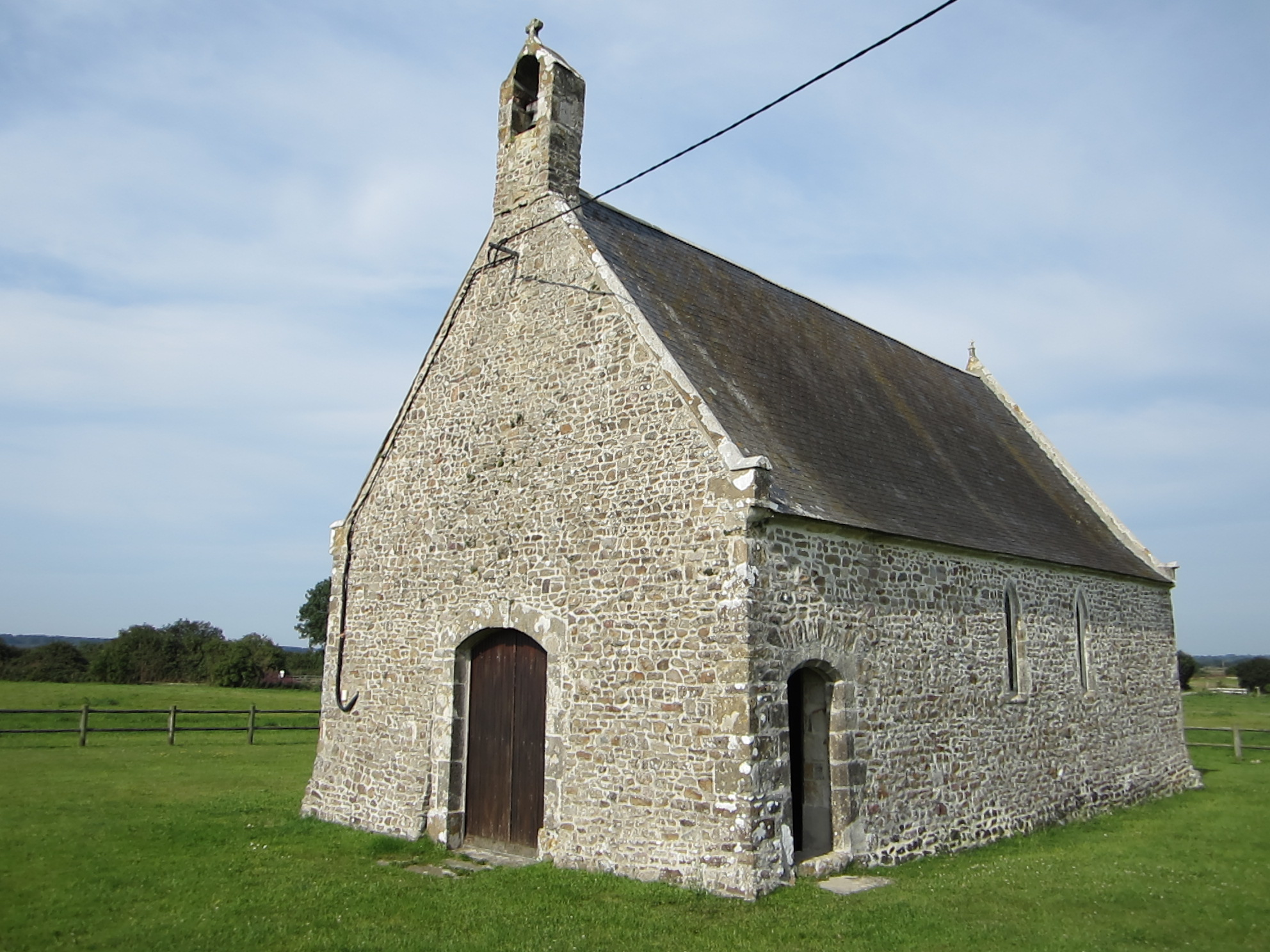 Chapelle Sainte-Anne des Marais, Gorges (Manche)